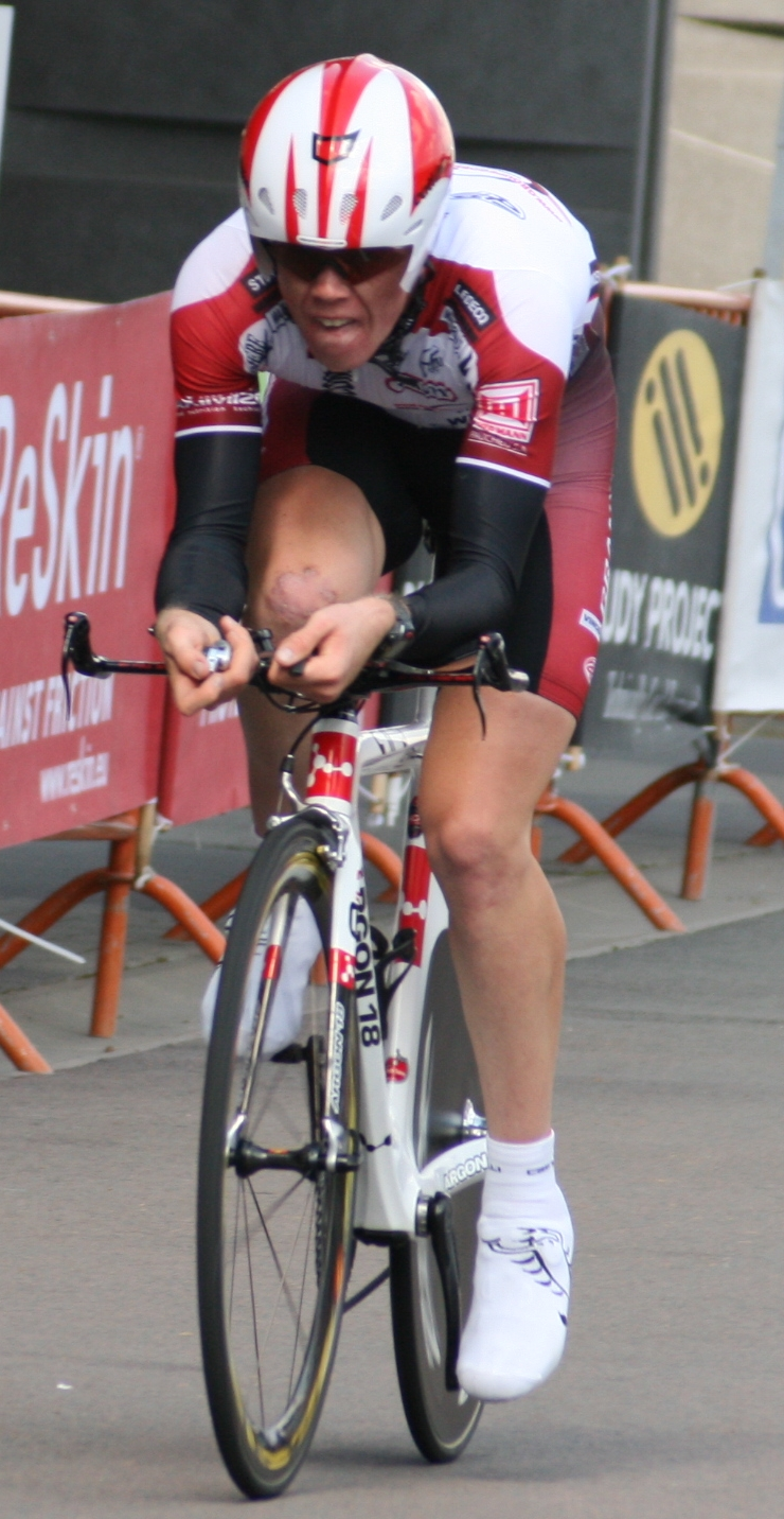 Romain Zingle, au championnat de Belgique Espoirs du contre-la-montre, à Mouscron